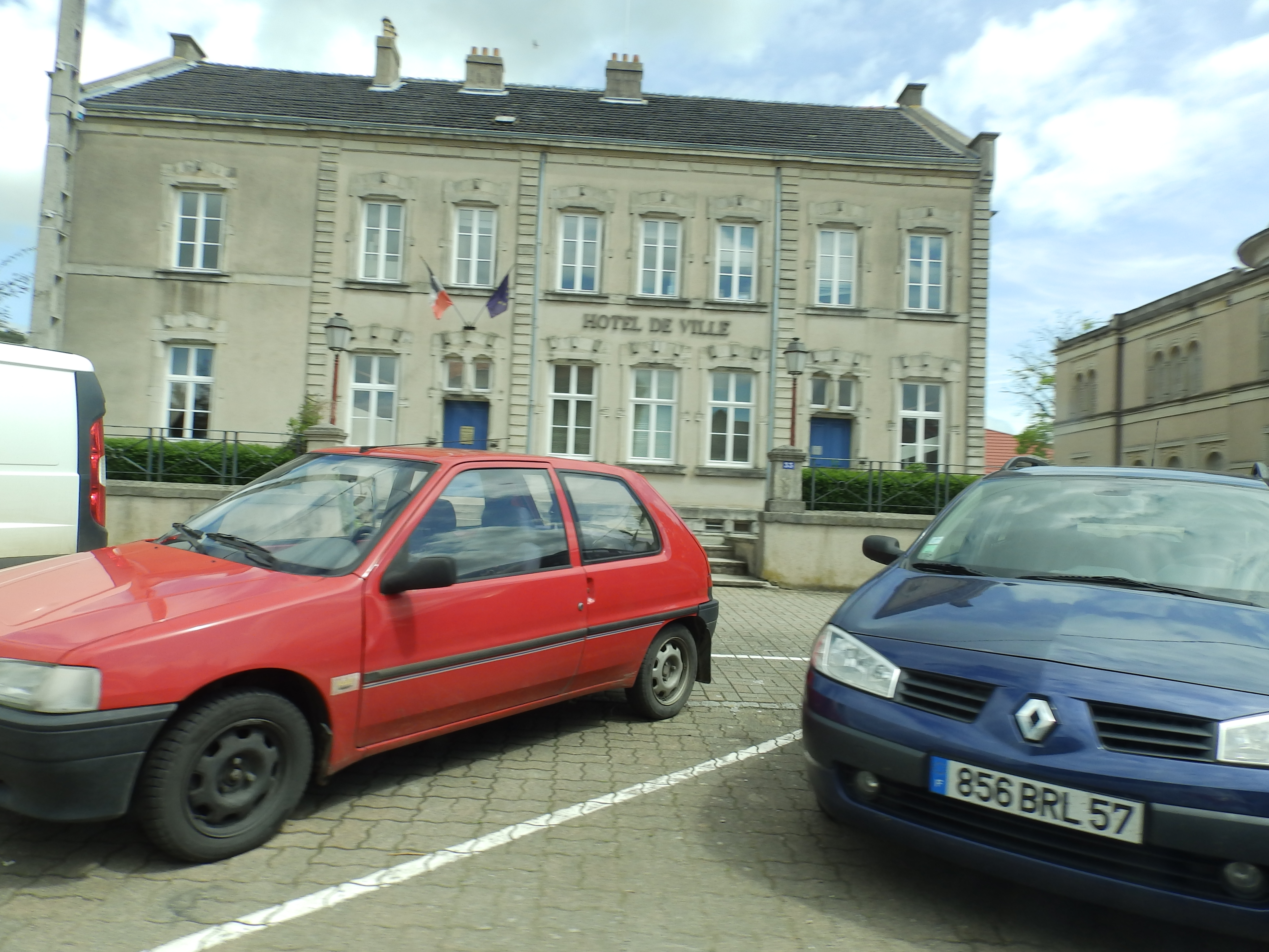 In Frankrijk